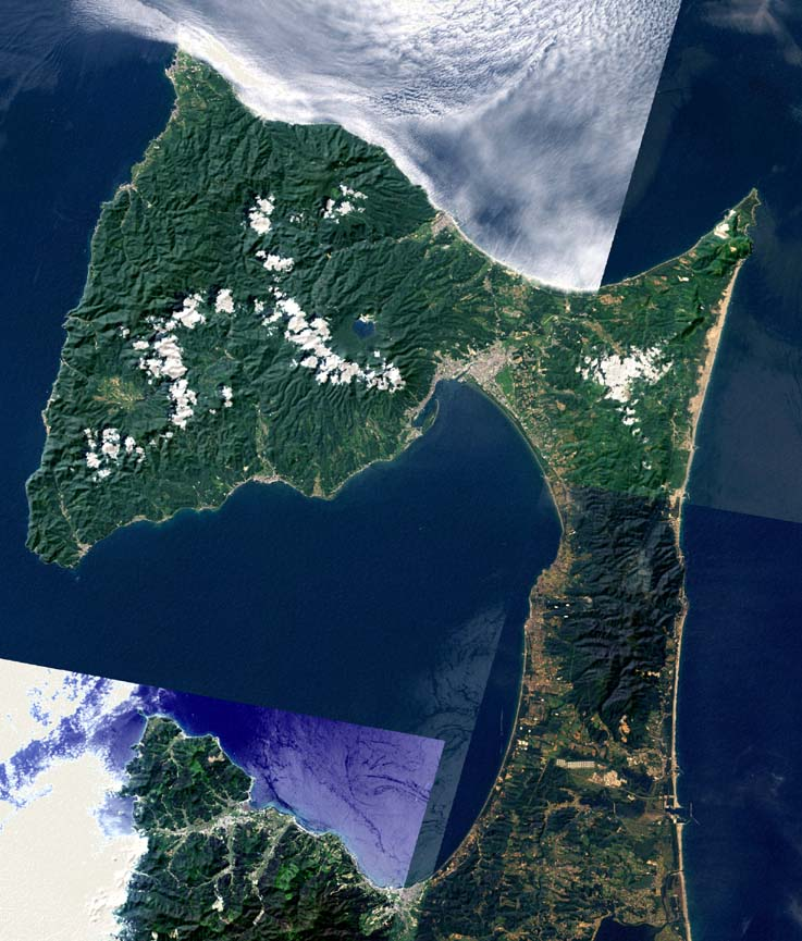 Shimokita Peninsula, Aomori, Japan.